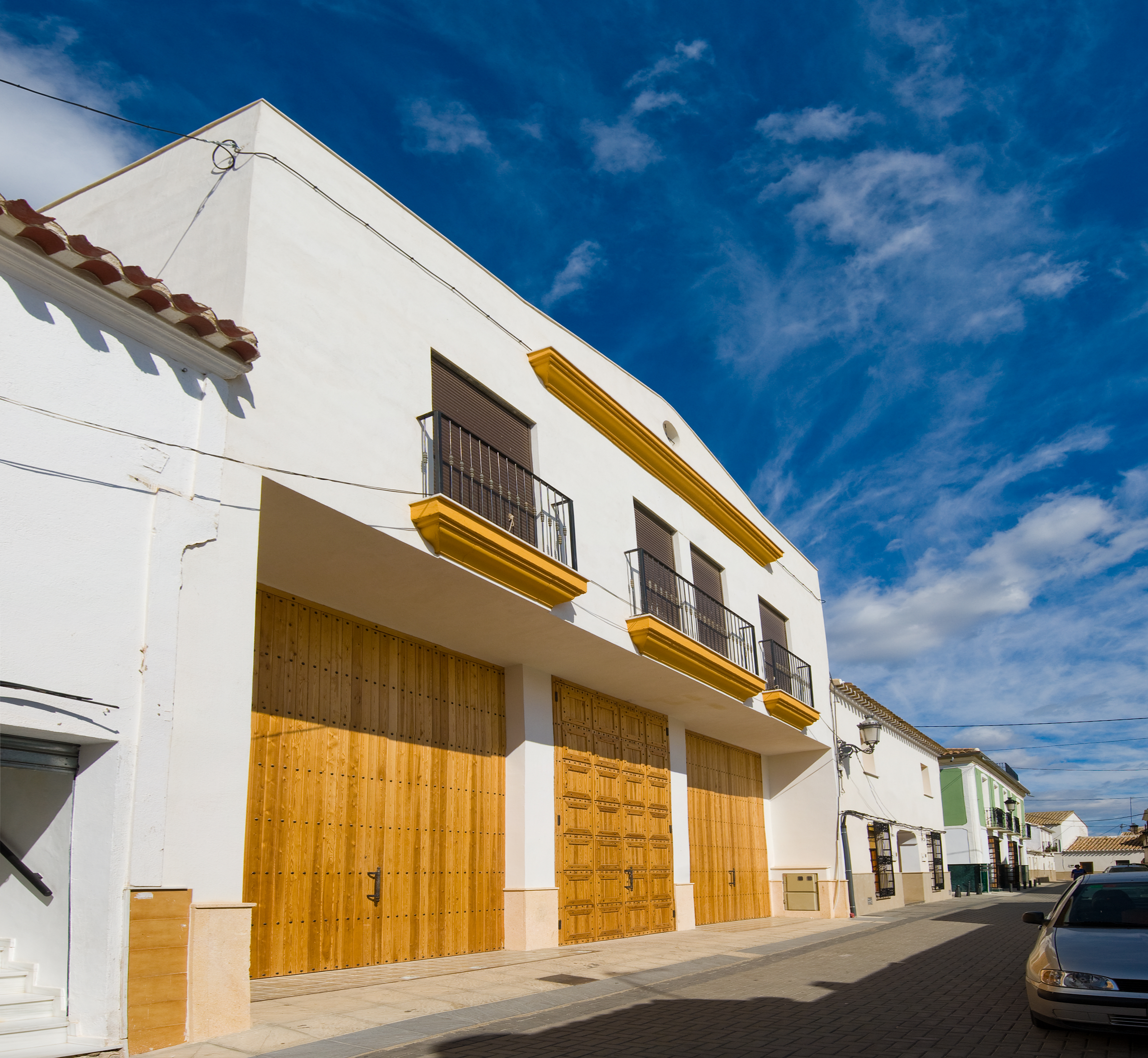 Vista de la Casa Museo de las Cofradías de Puerto Lumbreras (Región de Murcia).